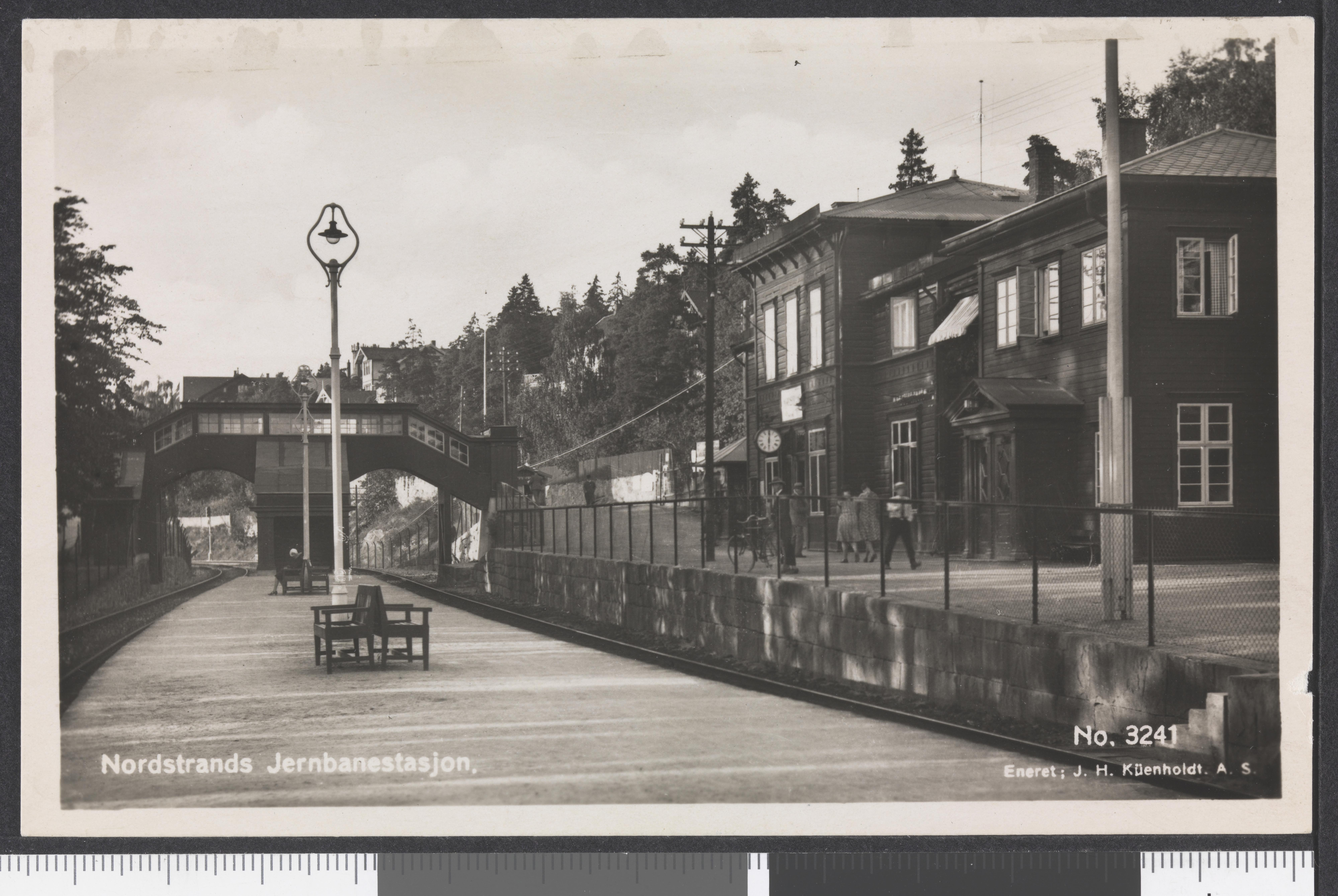 Bildet er hentet fra Nasjonalbibliotekets bildesamling Nordstrand,Nordstrand stasjon, Oslo, Oslo